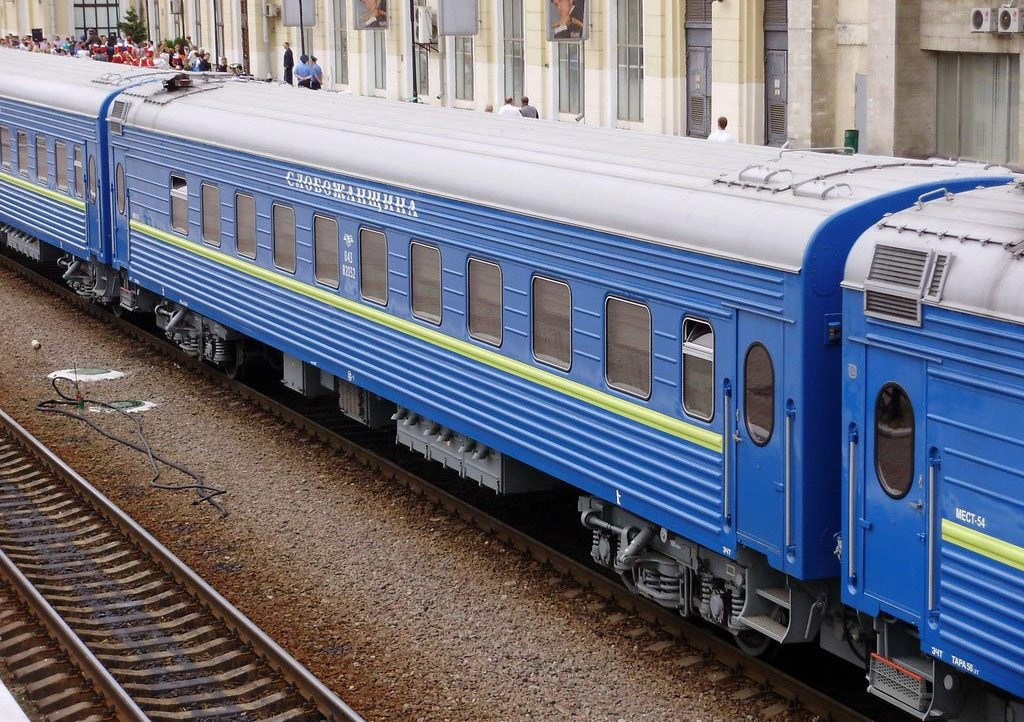 Вагоны поезда «Слобожанщина» на харьковском вокзале.